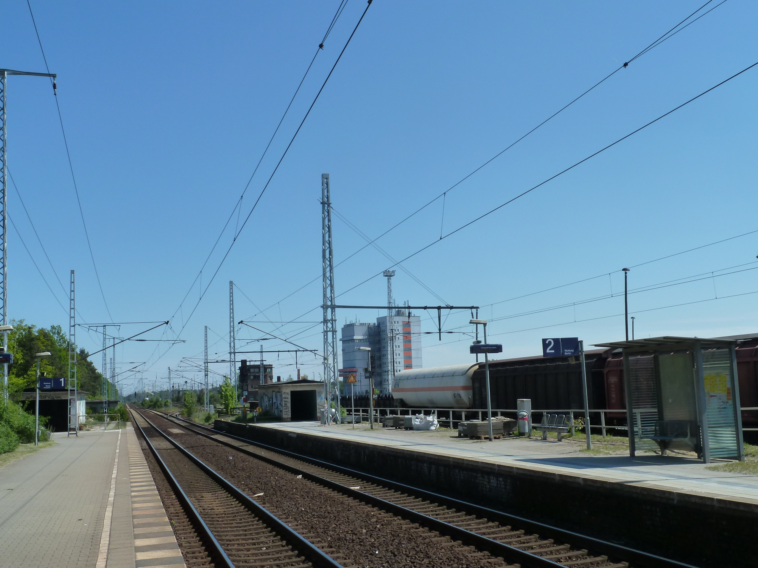 Bahnhof Seddin, Bahnsteige.Unknown seddin railway station, platforms